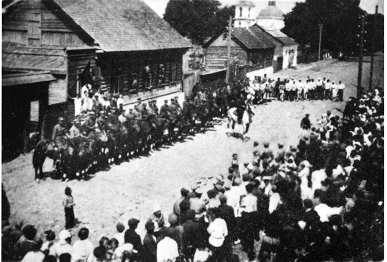 Беларуская (тарашкевіца): Дрыса (Drysa). Мітынг